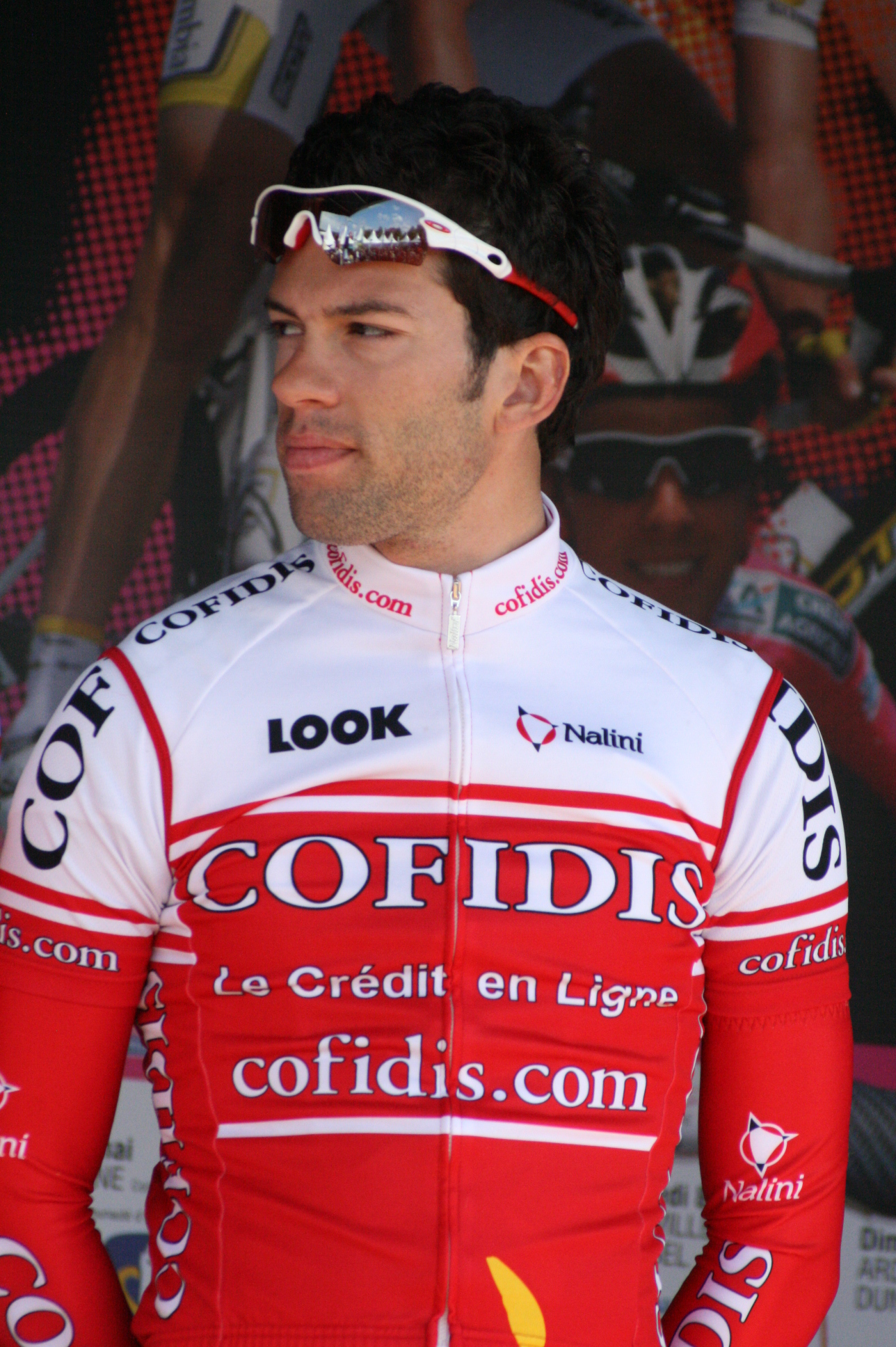 Julien El Farès, lors de la présentation des équipes des 4 jours de Dunkerque 2010